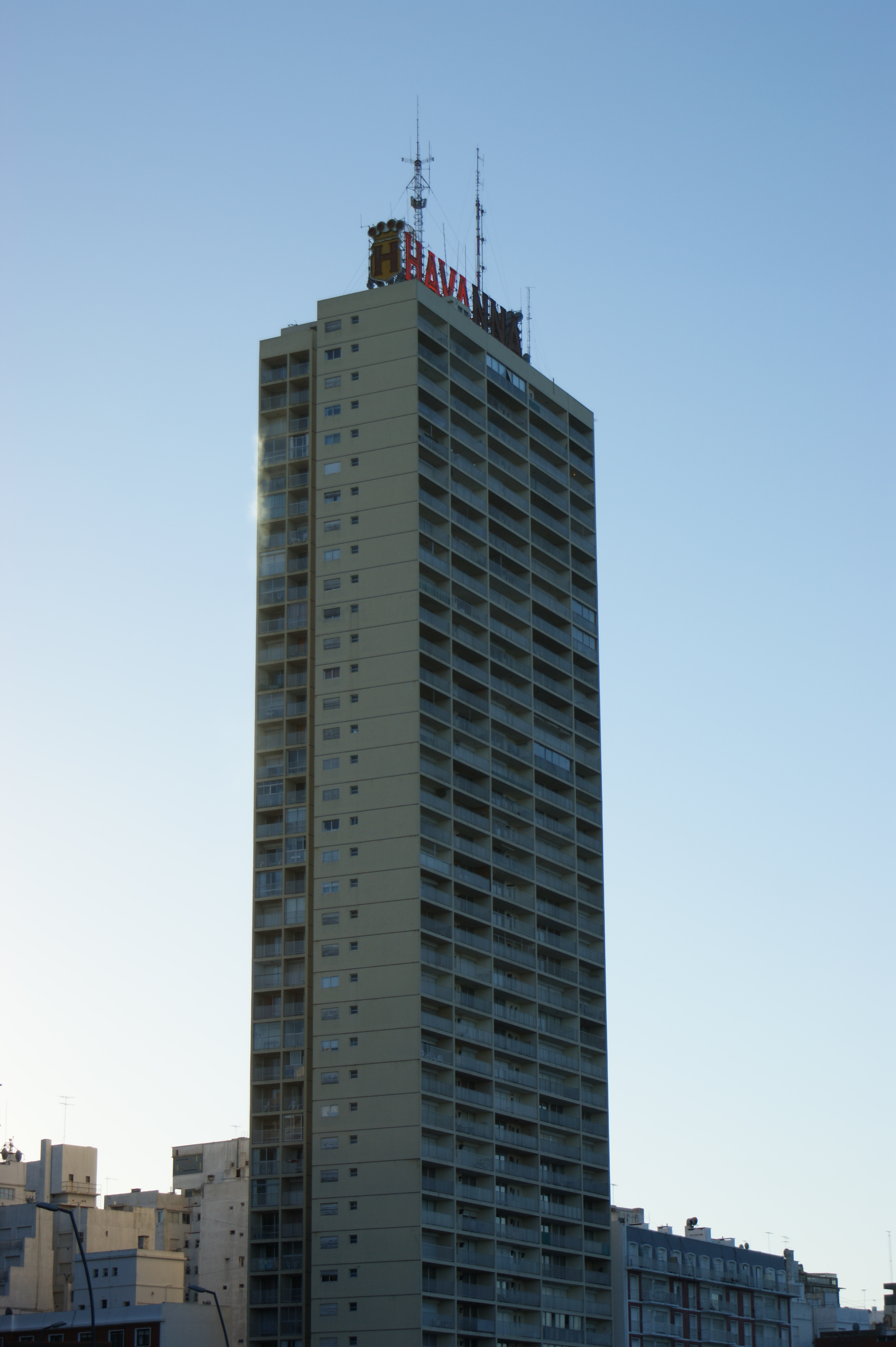 Edificio "Demetrio Elíades" ubicado en la ciudad de Mar del Plata